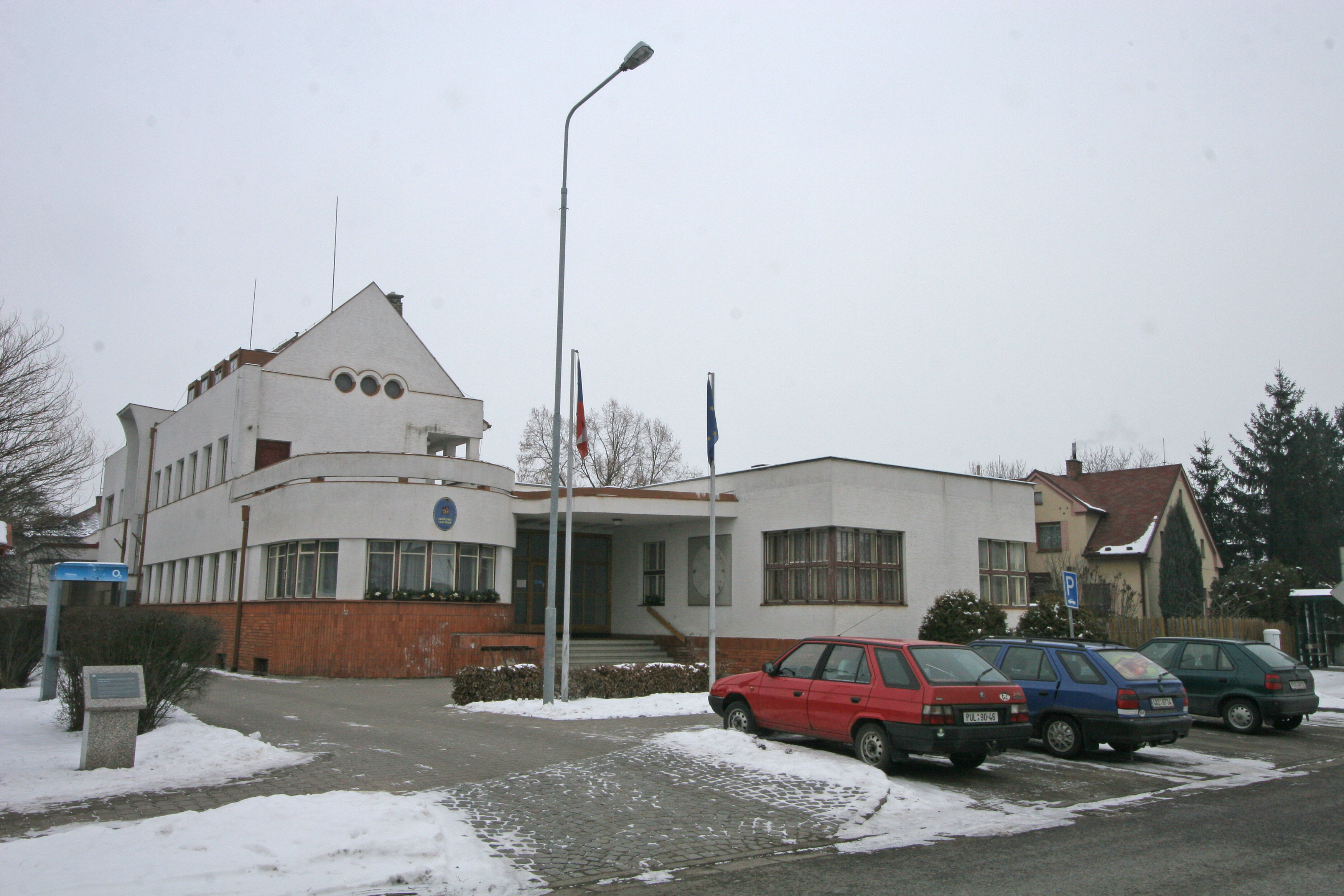 Obecní úřad (Dolní Roveň), Dolní Roveň 1